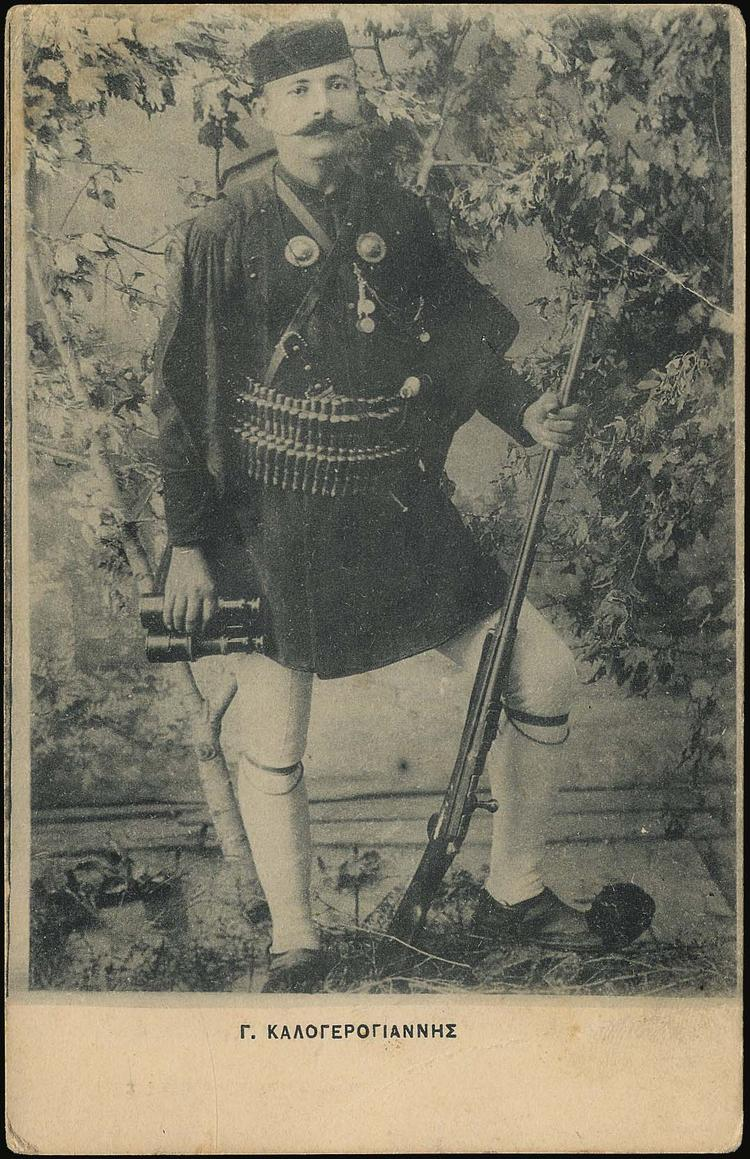 Георгиос Калогероянис